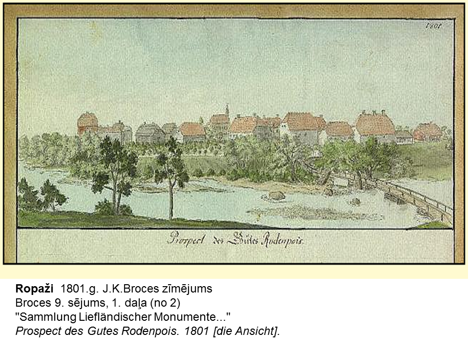 Ropaži 1801.g. J.K.Broces zīmējums